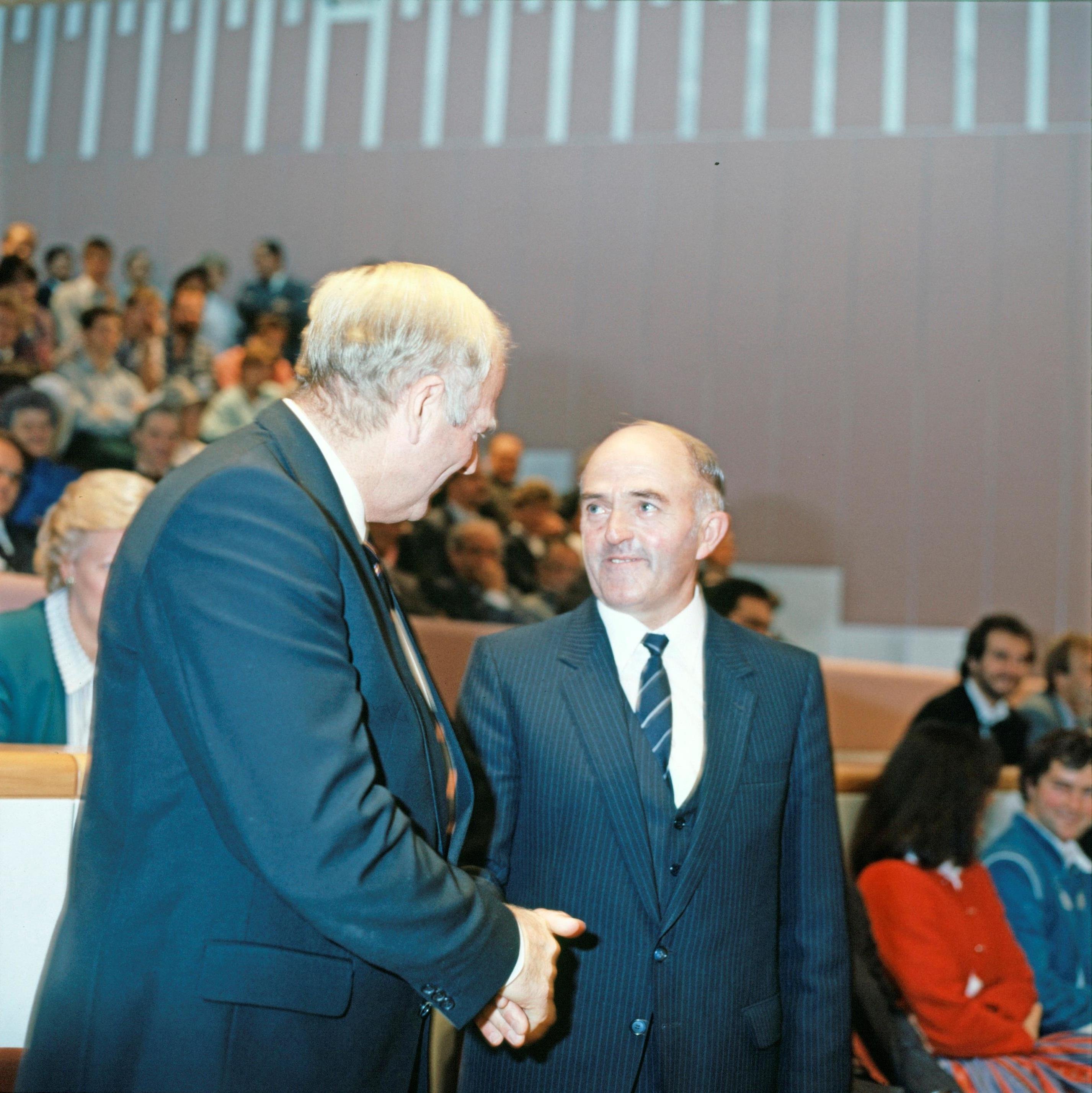 Der neue Vorarlberger Landesrat Anton Türtscher bei seiner Angelobung am 11. Oktober 1988 im Vorarlberger Landtag mit seinem Amtsvorgänger Konrad Blank.